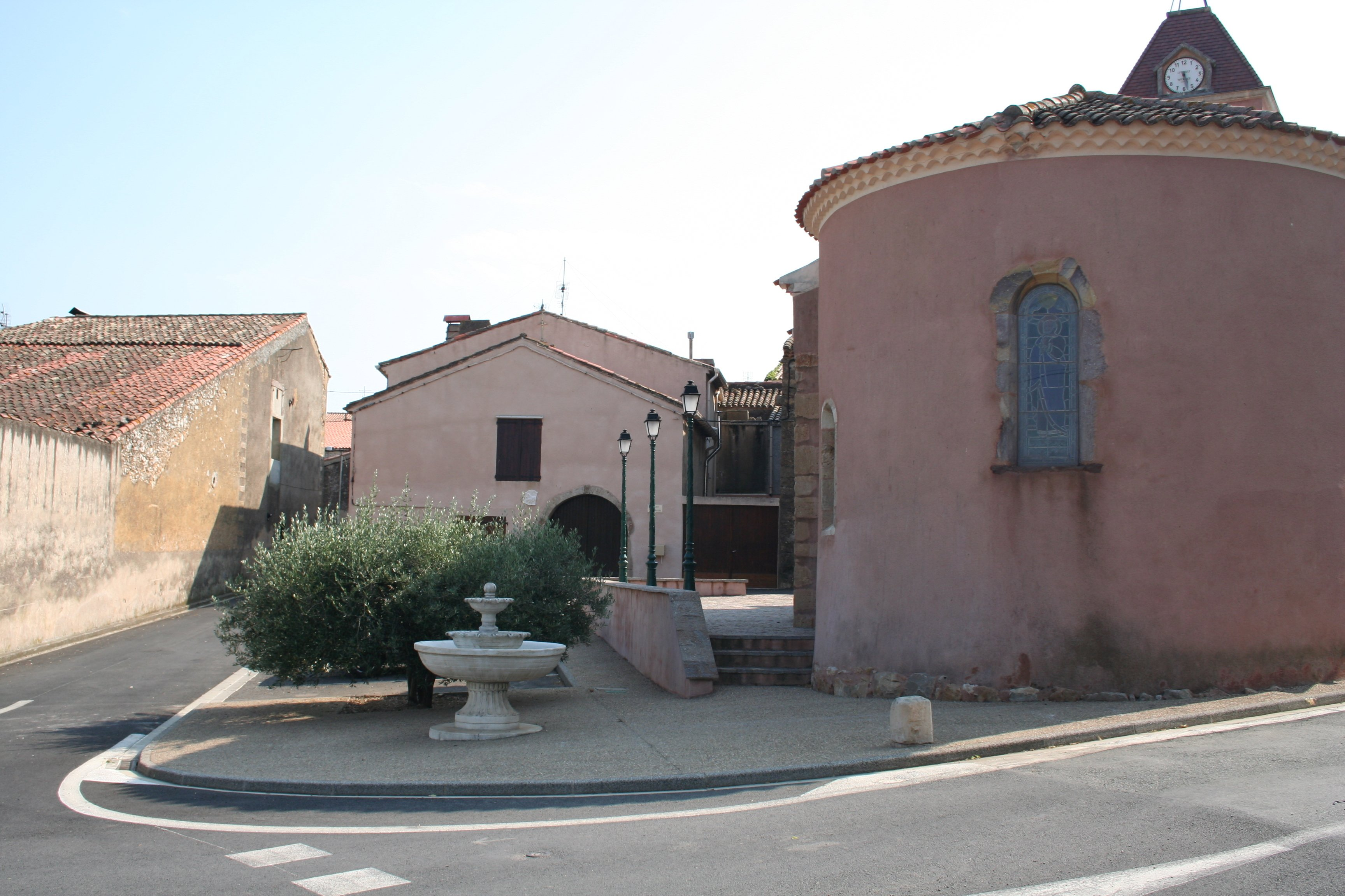 Place d'Assignan avec l'église, Hérault, France.